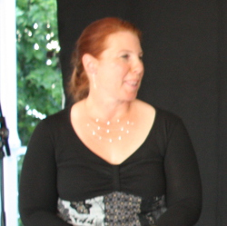 Angelika Trabert beim Mannheimer Maimarktturnier 2011